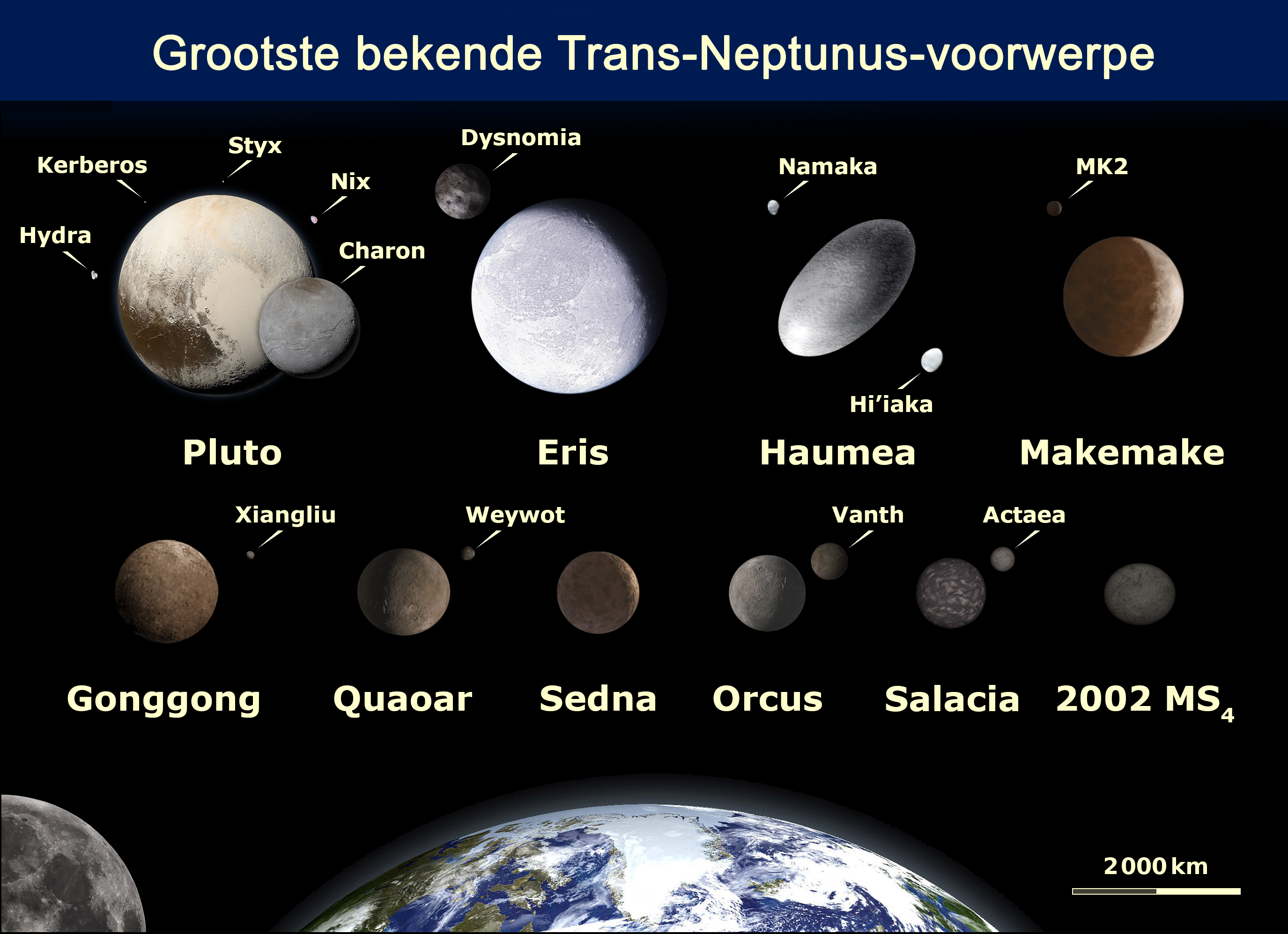 ’n Kunstenaarsvoorstelling van Pluto, Eris, Makemake, Haumea, Sedna, (225088) 2007 OR10, Quaoar en Orcus saam met die Aarde en die Maan.